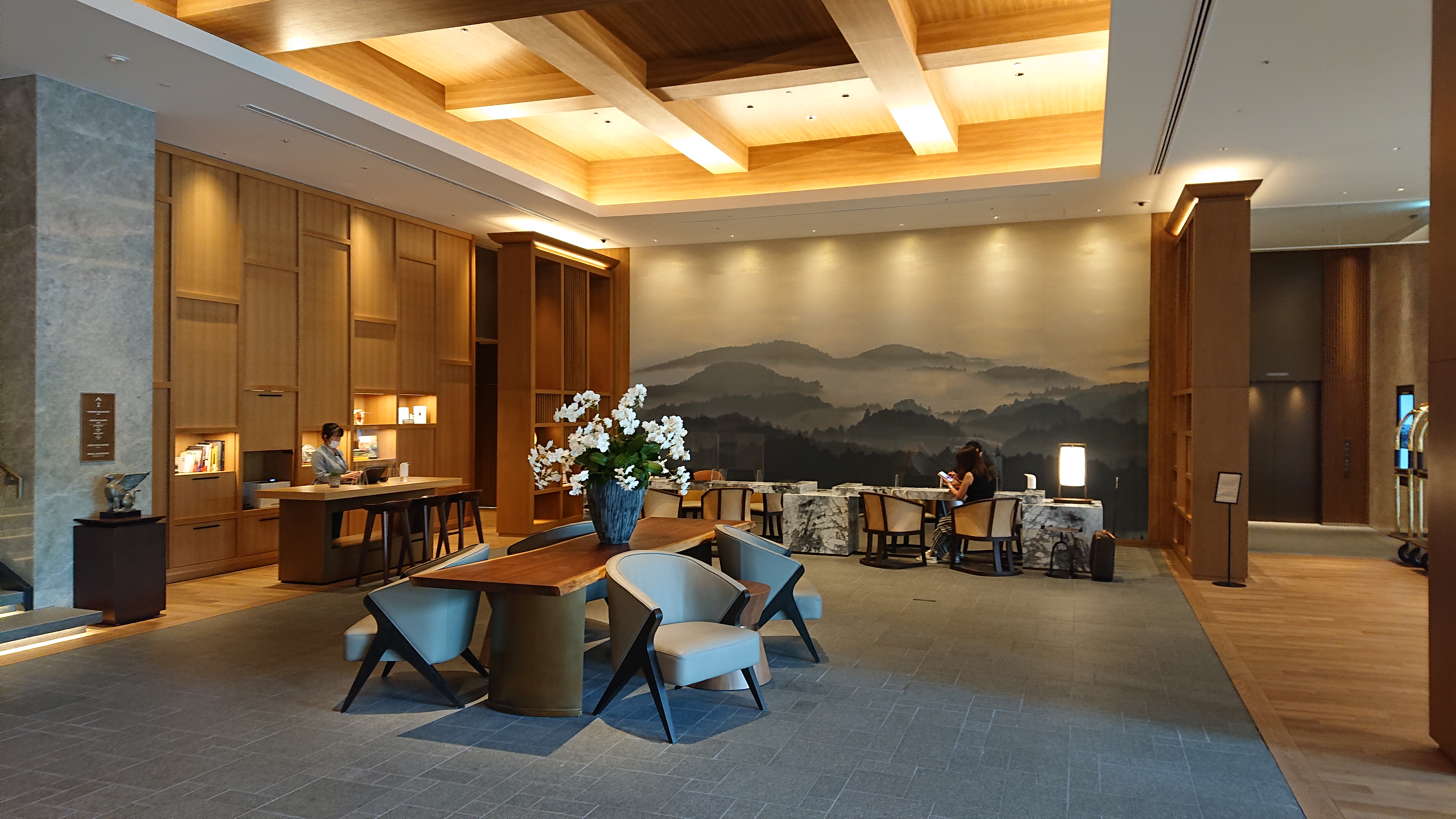 JWマリオット・ホテル奈良のロビー